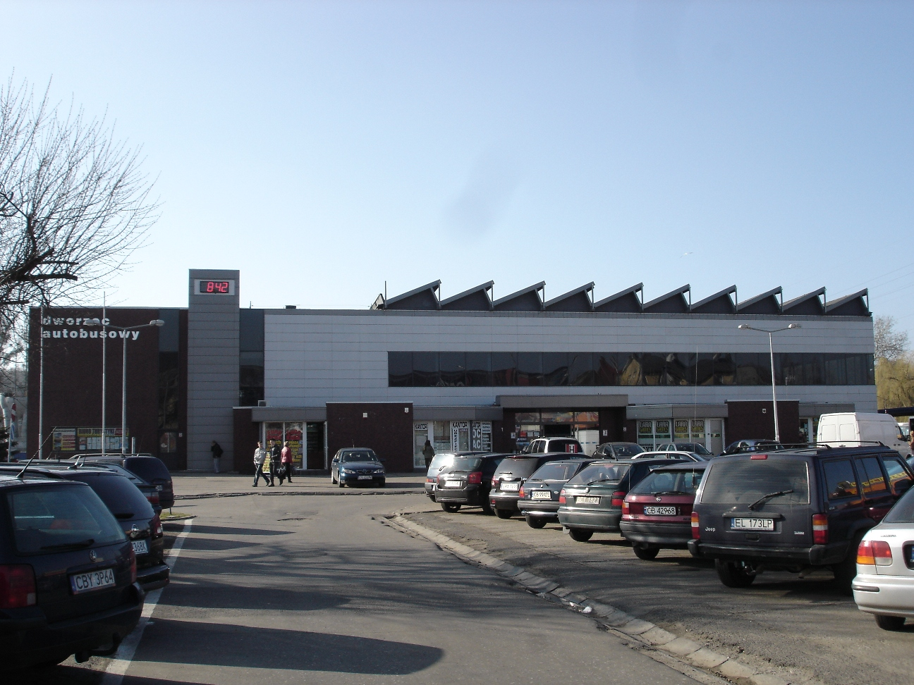 Dworzec PKS przy ul. Jagiellońskiej w Bydgoszczy.